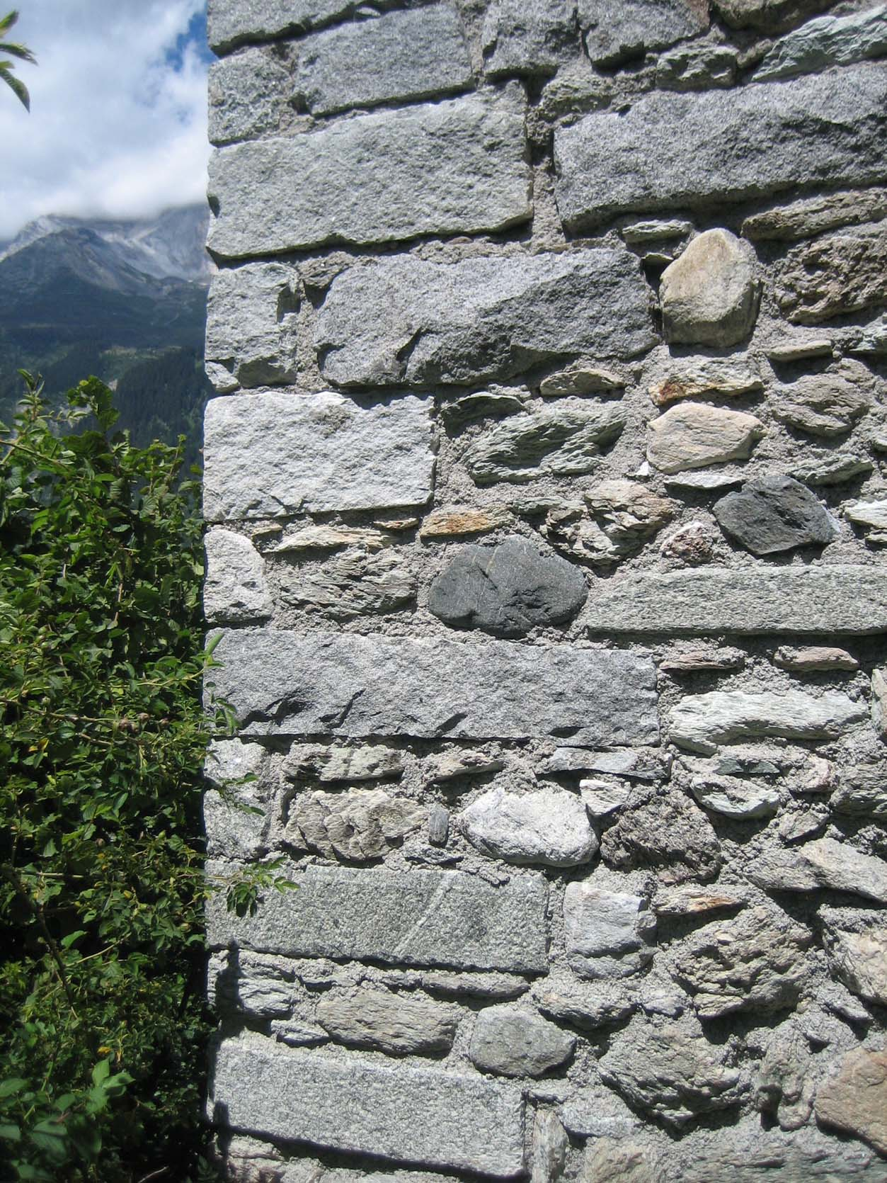 Mauerecke SW